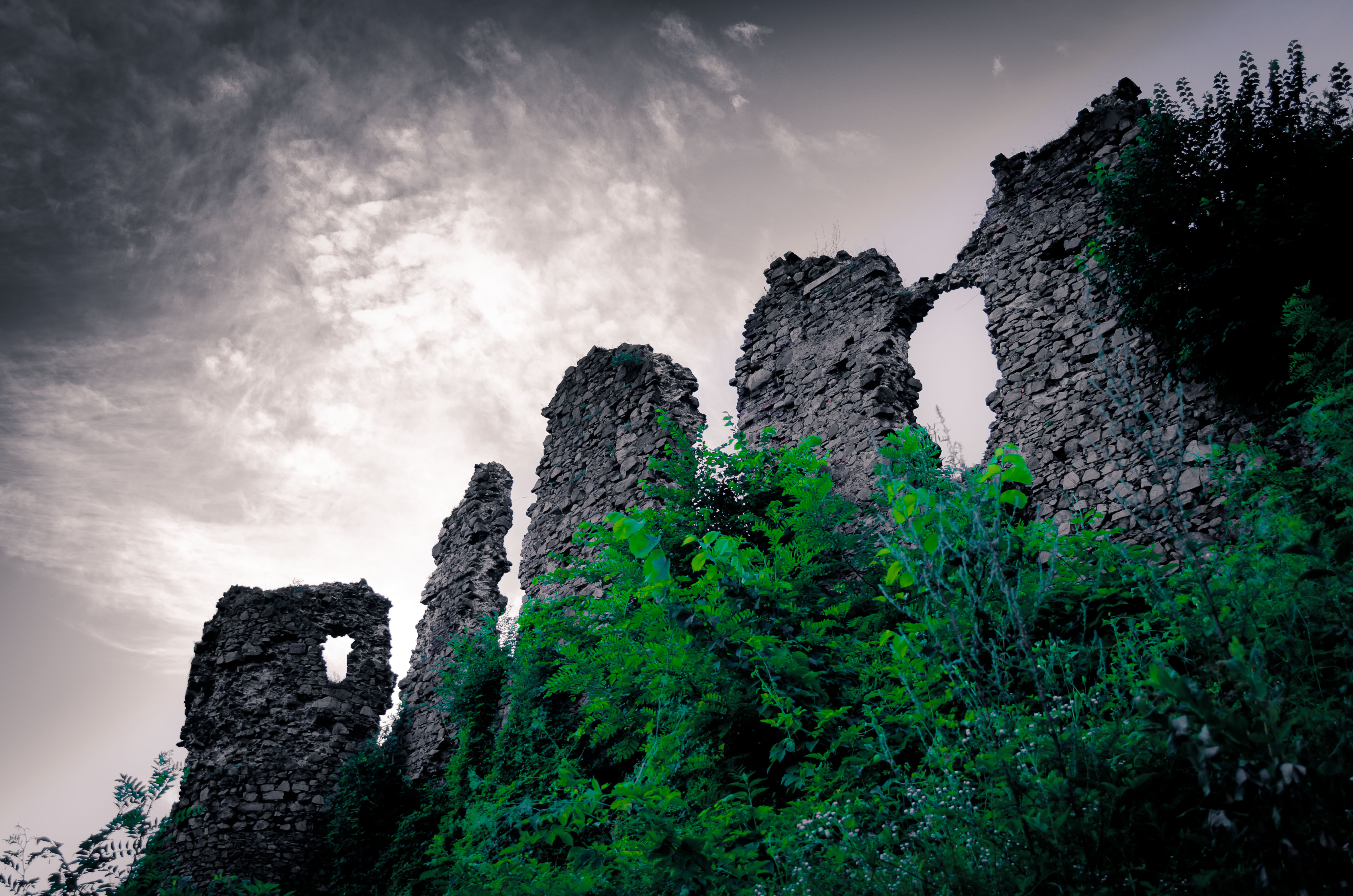 Руїни замку м. Хуст